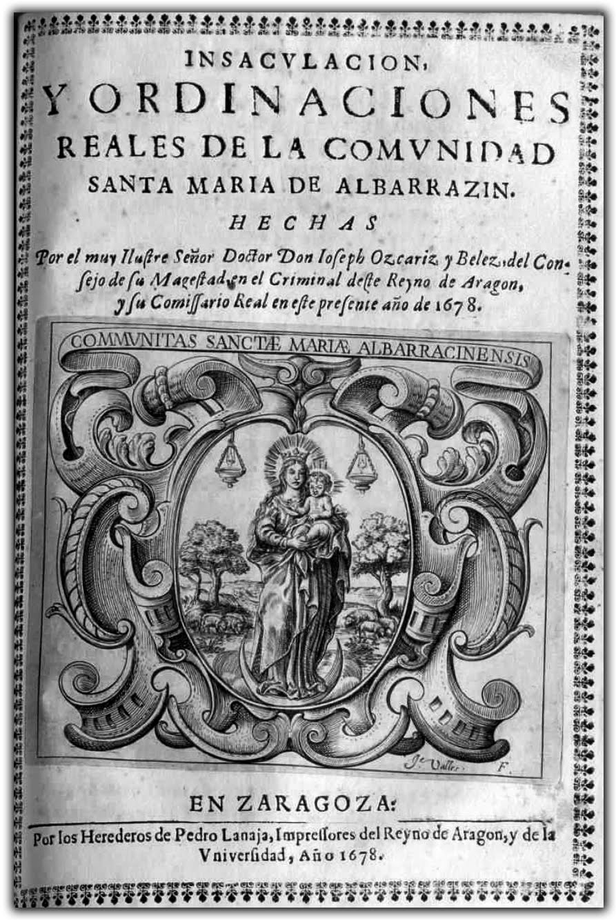 Aragonés: Insaculación y Ordinaciones Reales de la Comunidad Santa María de Albarrazín